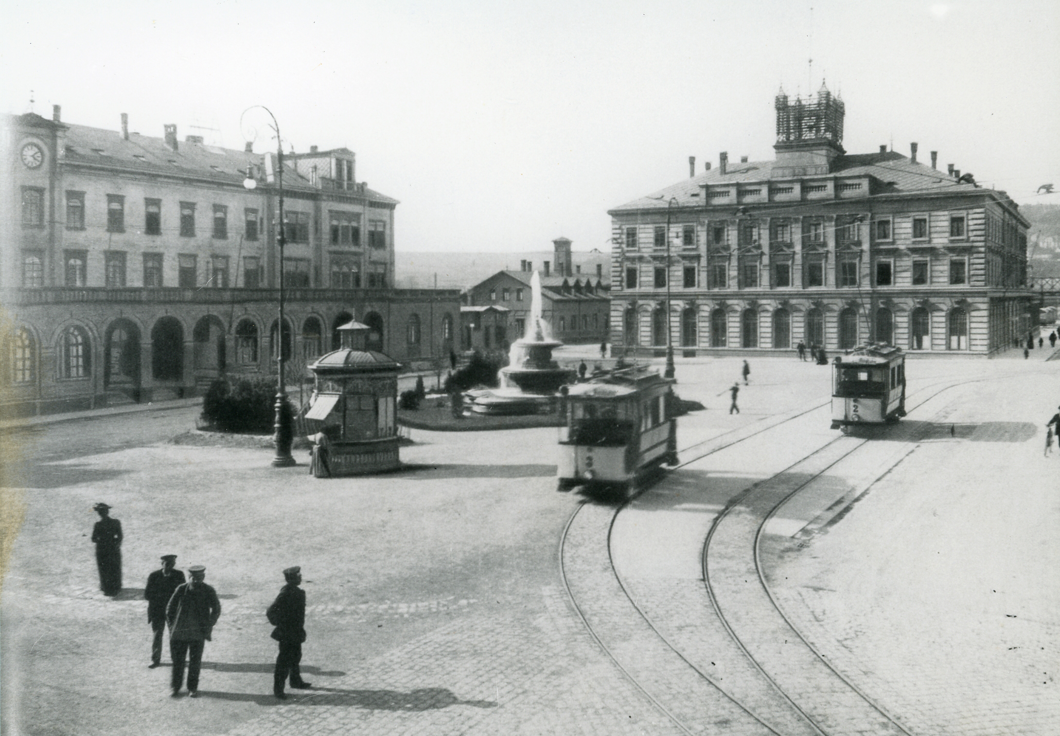 Bahnhofsvorplatz nach NNW; links Bahnhofsgebäude, dahinter Baracke (Nr. 4 und 6), rechts Hauptpost (Nr. 1), davor Kiosk und Brunnen